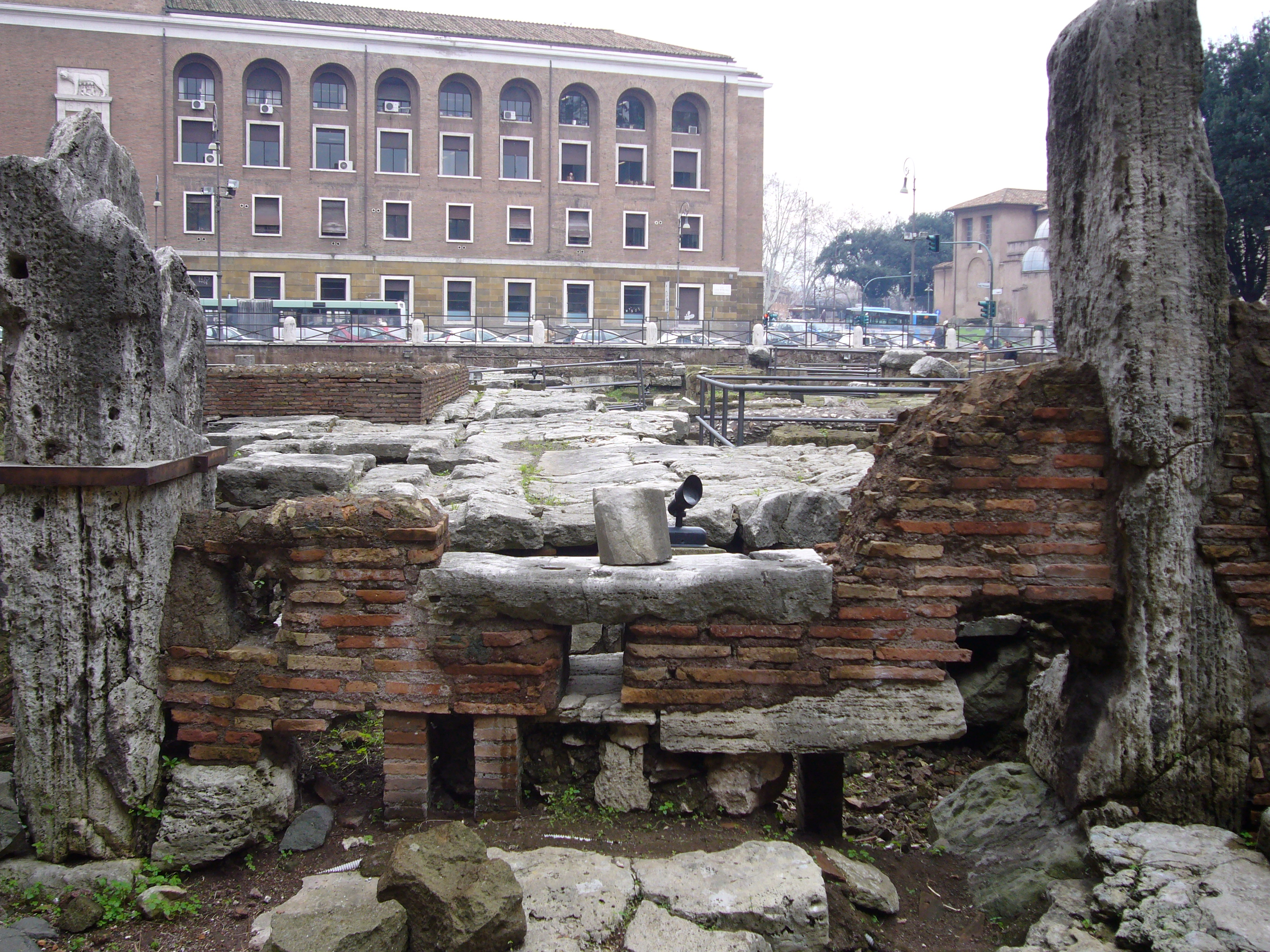 Roma, area sacra di Sant'Omobono. Pavimentazione in travertino